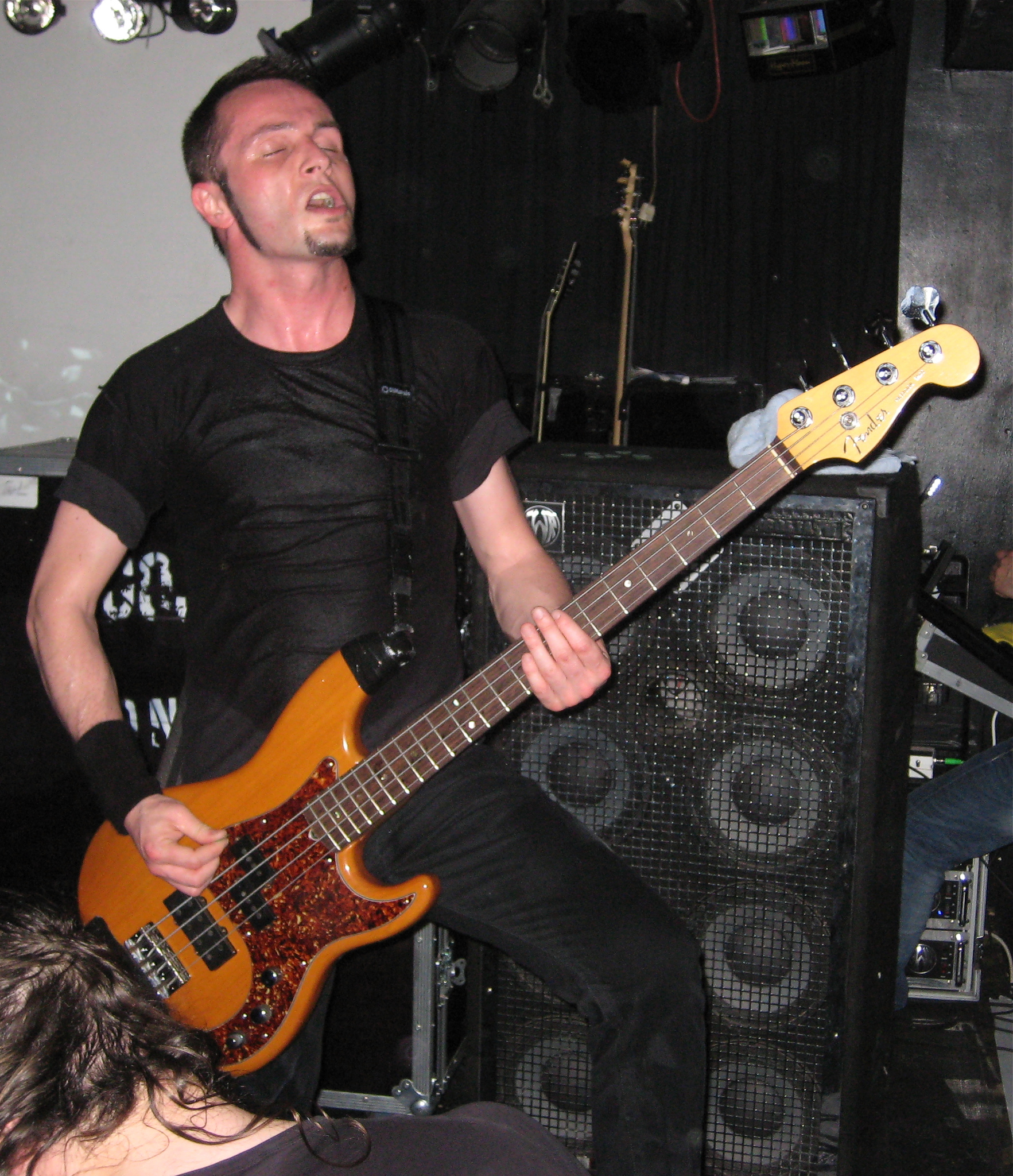 Gojira live @ Nachtleben, Frankfurt/Main